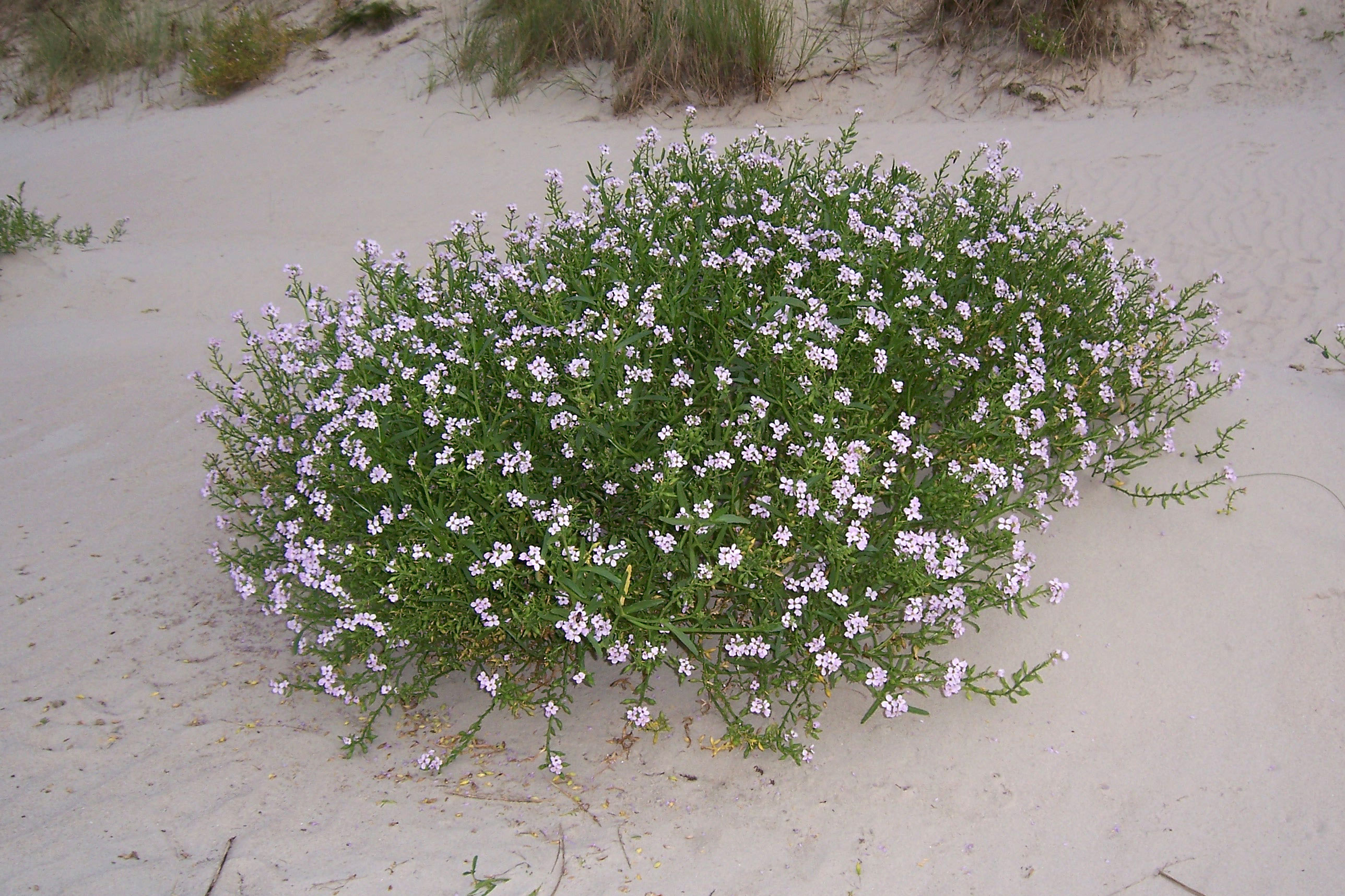 Nordseeinsel Spiekeroog: Europäischer Meersenf (Cakile maritima)